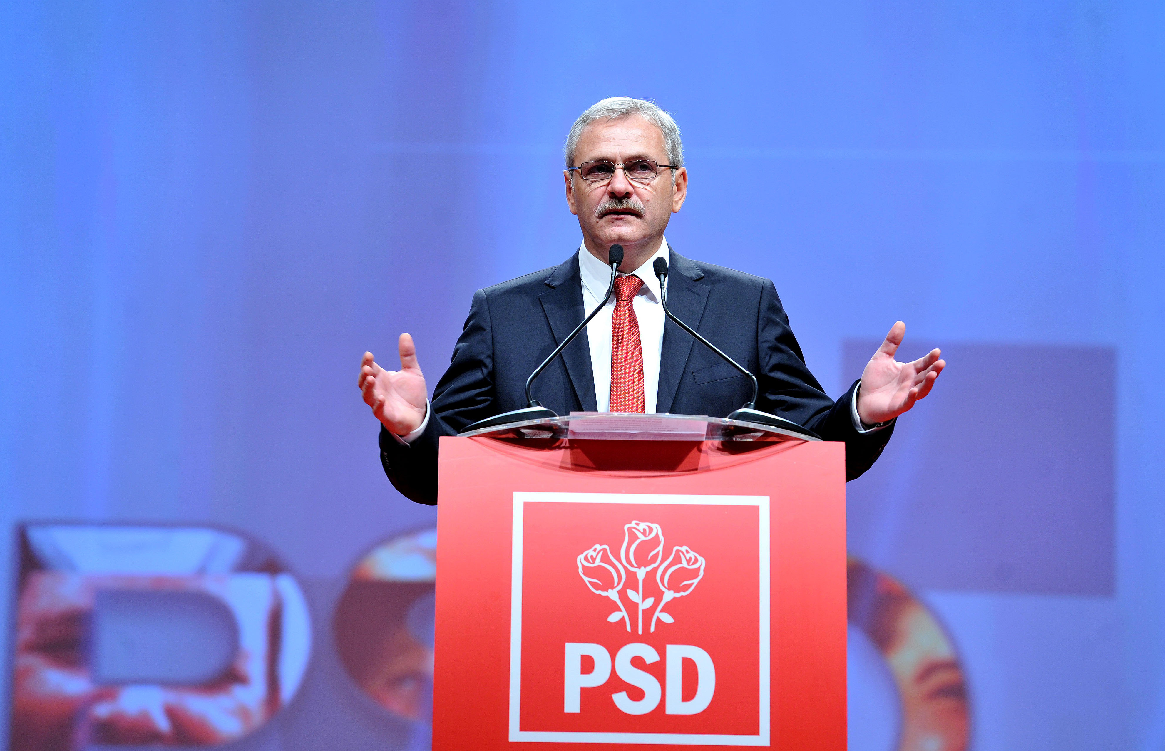 Liviu Dragnea la Consiliul National al PSD